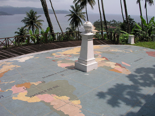 O marco do Equador erguido por Gago Coutinho, no ilhéu das Rolas, em S. Tomé.